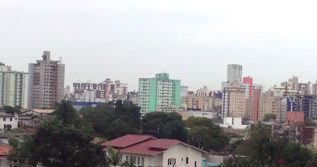 Vista da cidade de Criciúma